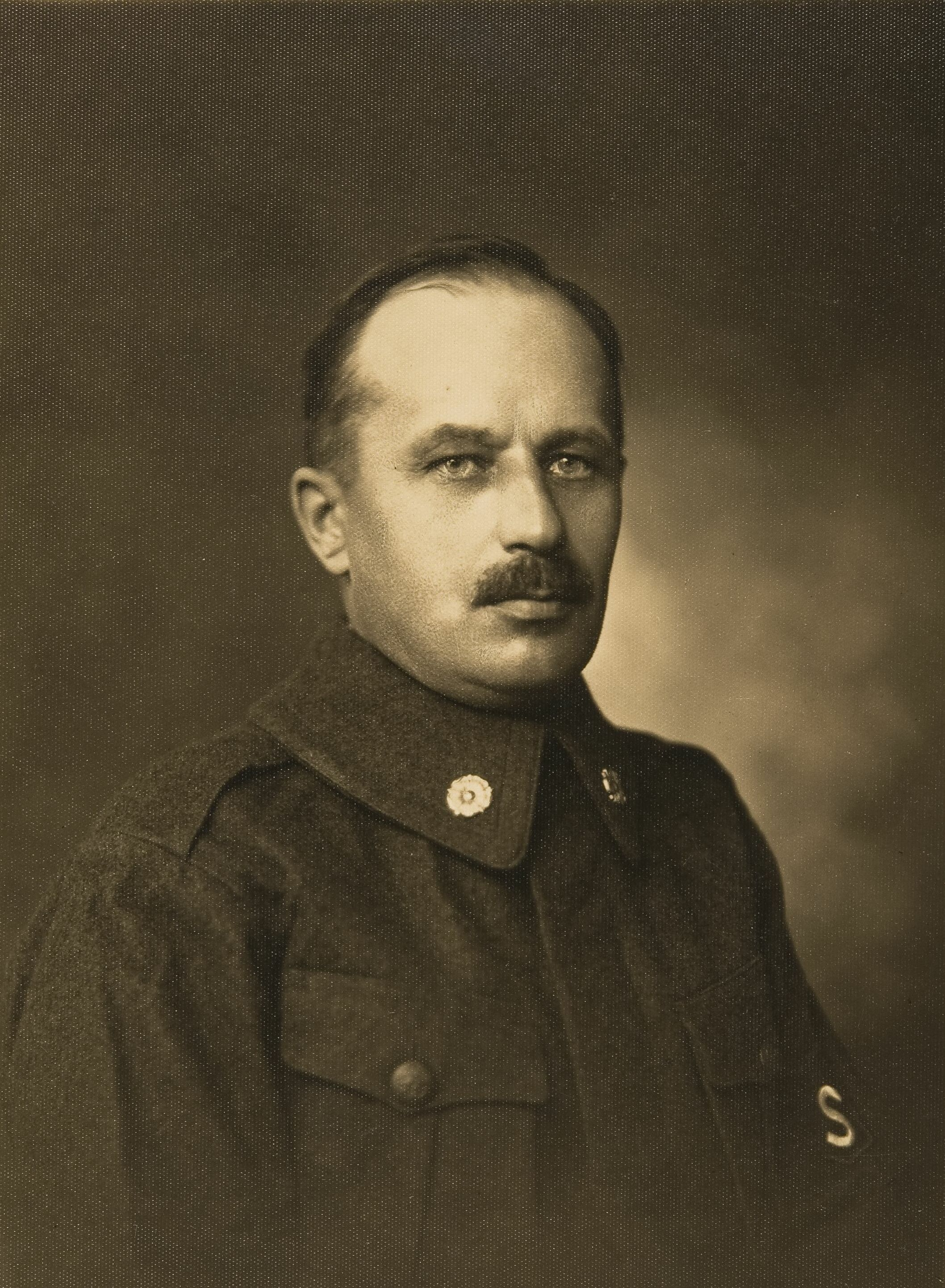 Kansanedustaja ja myöhempi puolustusministeri Albin Manner